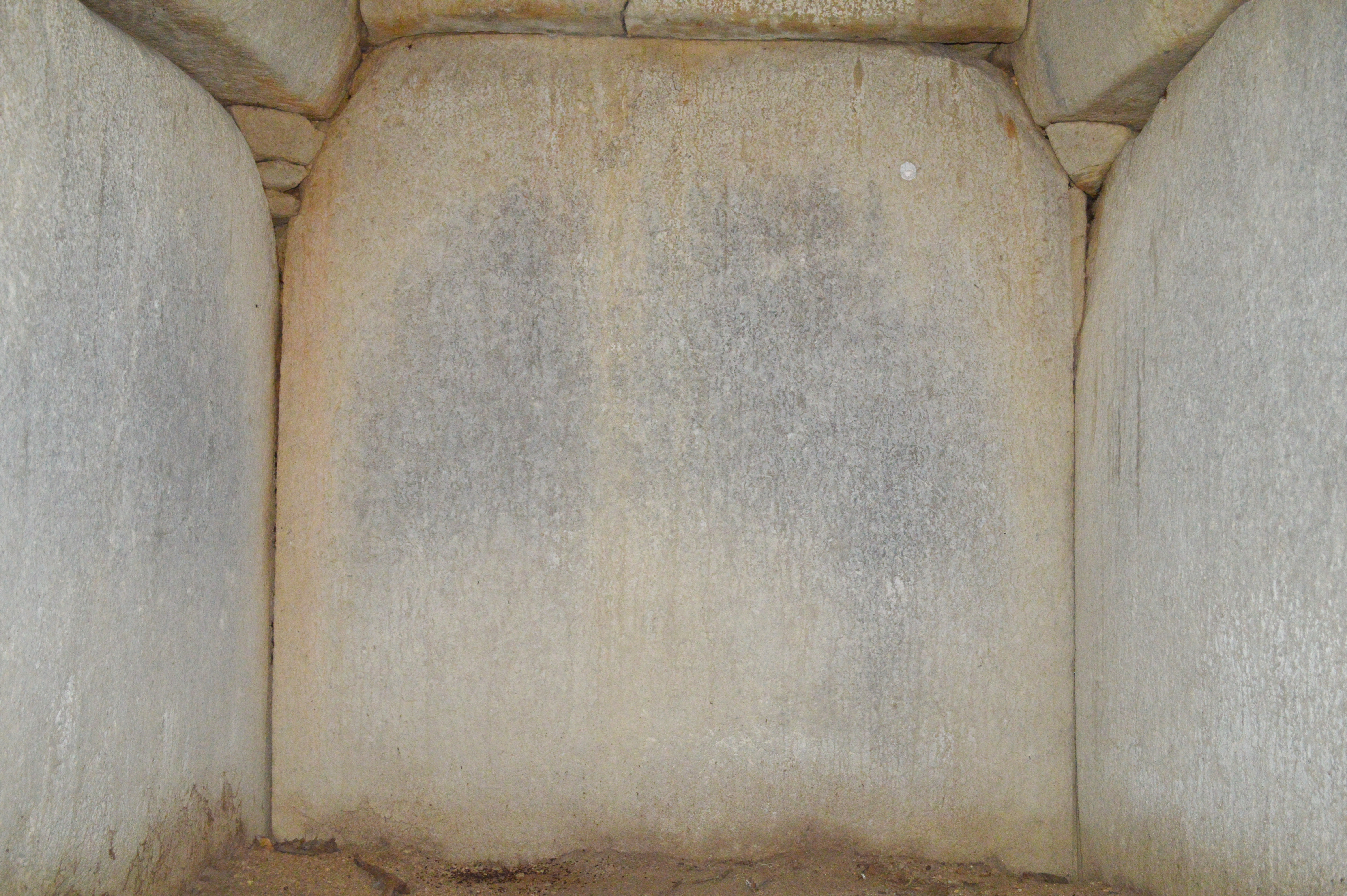 福庭古墳 石室玄室 Nikon D3200